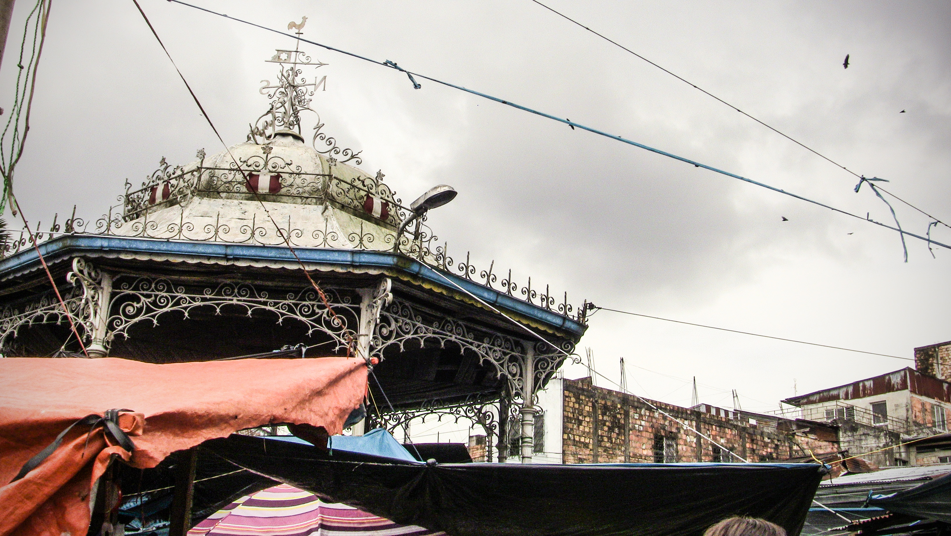 Glorieta Ubicada en la Zona Baja De Belén. A principios del siglo 20 se utilizó mucho las glorietas, y esta estuvo en un principio en la Plaza de Armas, pero solo fue por poco tiempo, pues después fue movida hasta la plazuela donde se encuentra en la actualidad.